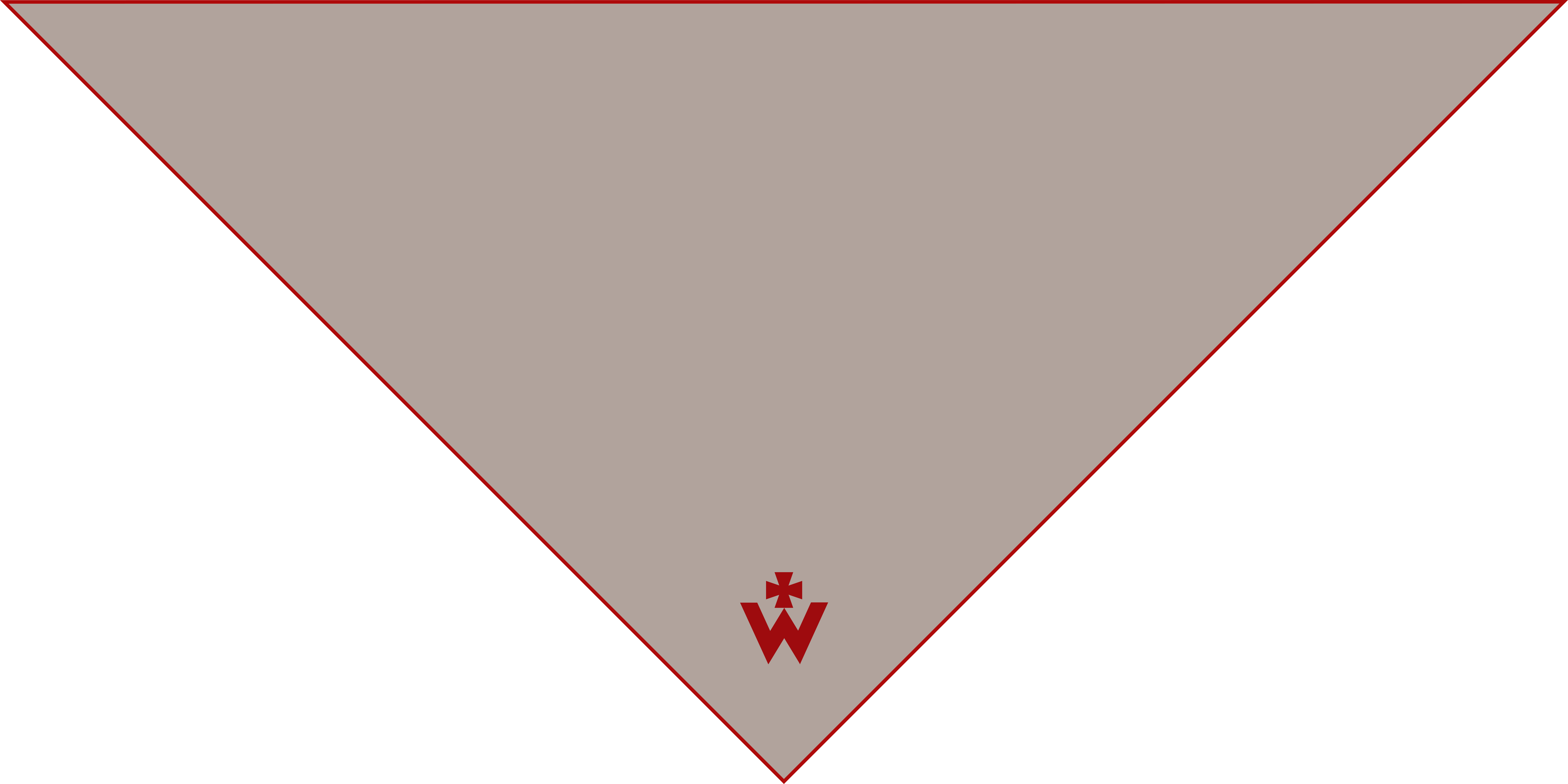 Хустина куреня УСП ч.27 Хмельниченки Пласту НСОУ